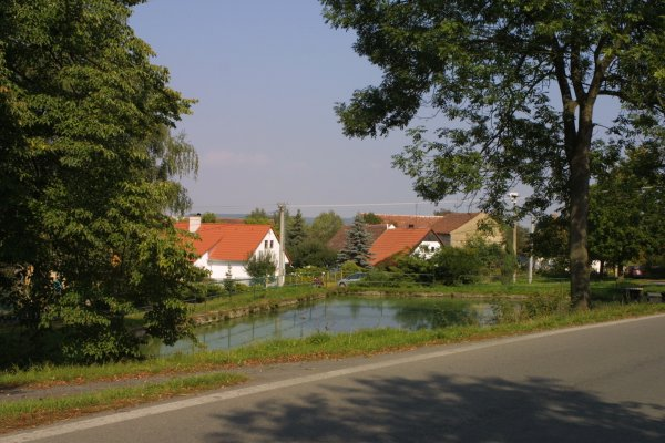 Pohled na střed vesnice Břízsko, součást obce Kozojedy, okres Plzeň-sever.